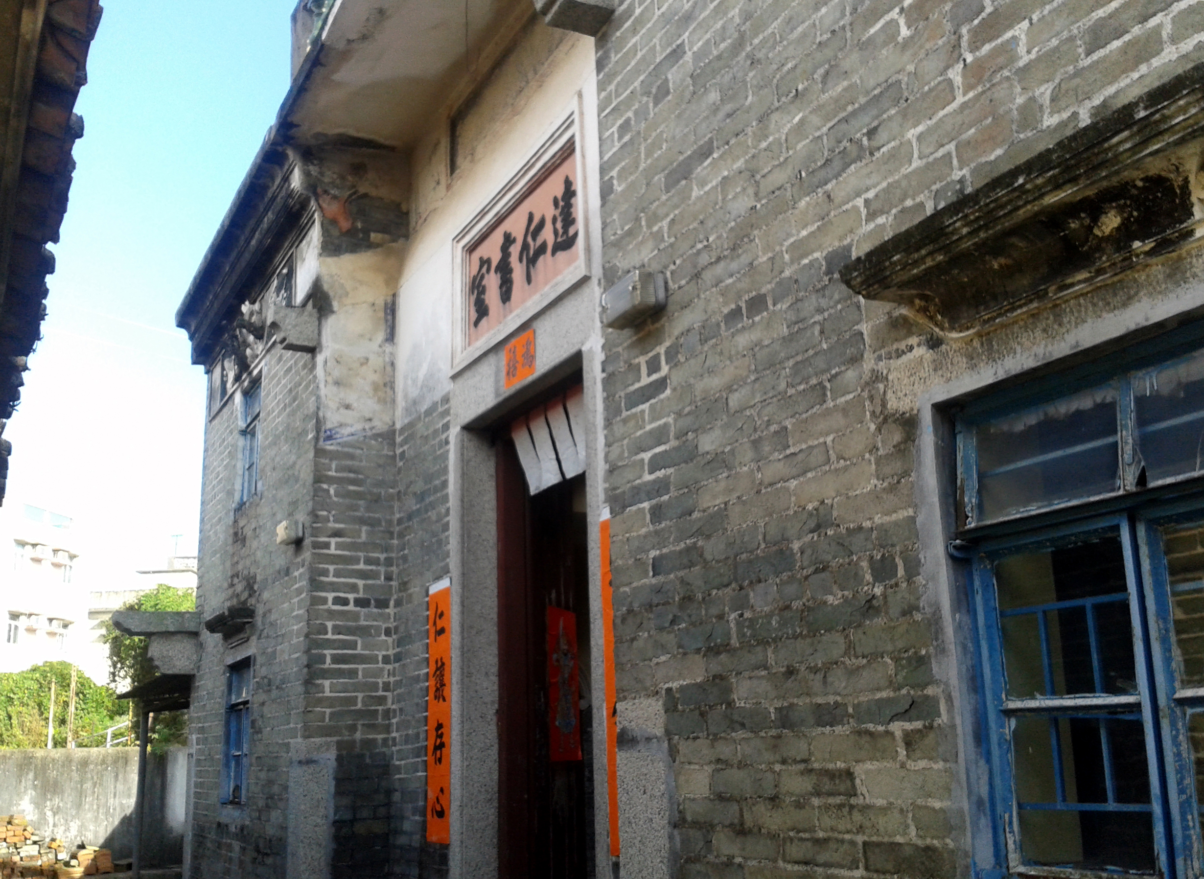 中文（香港）: 達仁書室